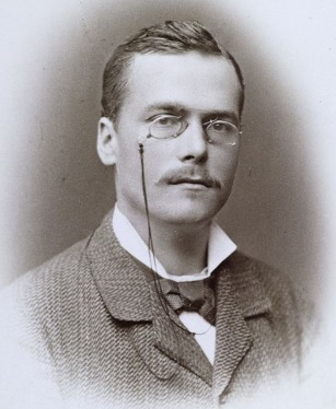 Visitenkartenporträt mit Schulterstück nach links gewandt, den Kopf im Viertelprofil, Blick nach vorn zum Betrachter, mit kurzem Haar, Kneifer am Band, Hemd mit hochgeklapptem Kragen, Querbinder, ... Auf der Rückseite handschriftlich mit schwarzer Tinte: "Eugen Sapper. Sommer 1882.-"- Quelle